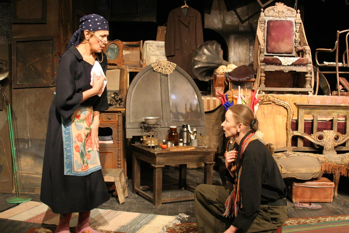 Сцена из спектакля Саратовского академического театра драмы «Хлам» по пьесе Йосефа Бар-Йосефа. Актёры Тамара Джураева, Алиса Зыкина